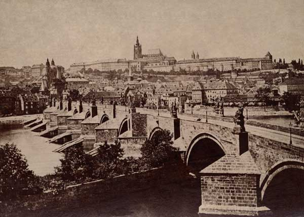 Karlův most a Pražský hrad